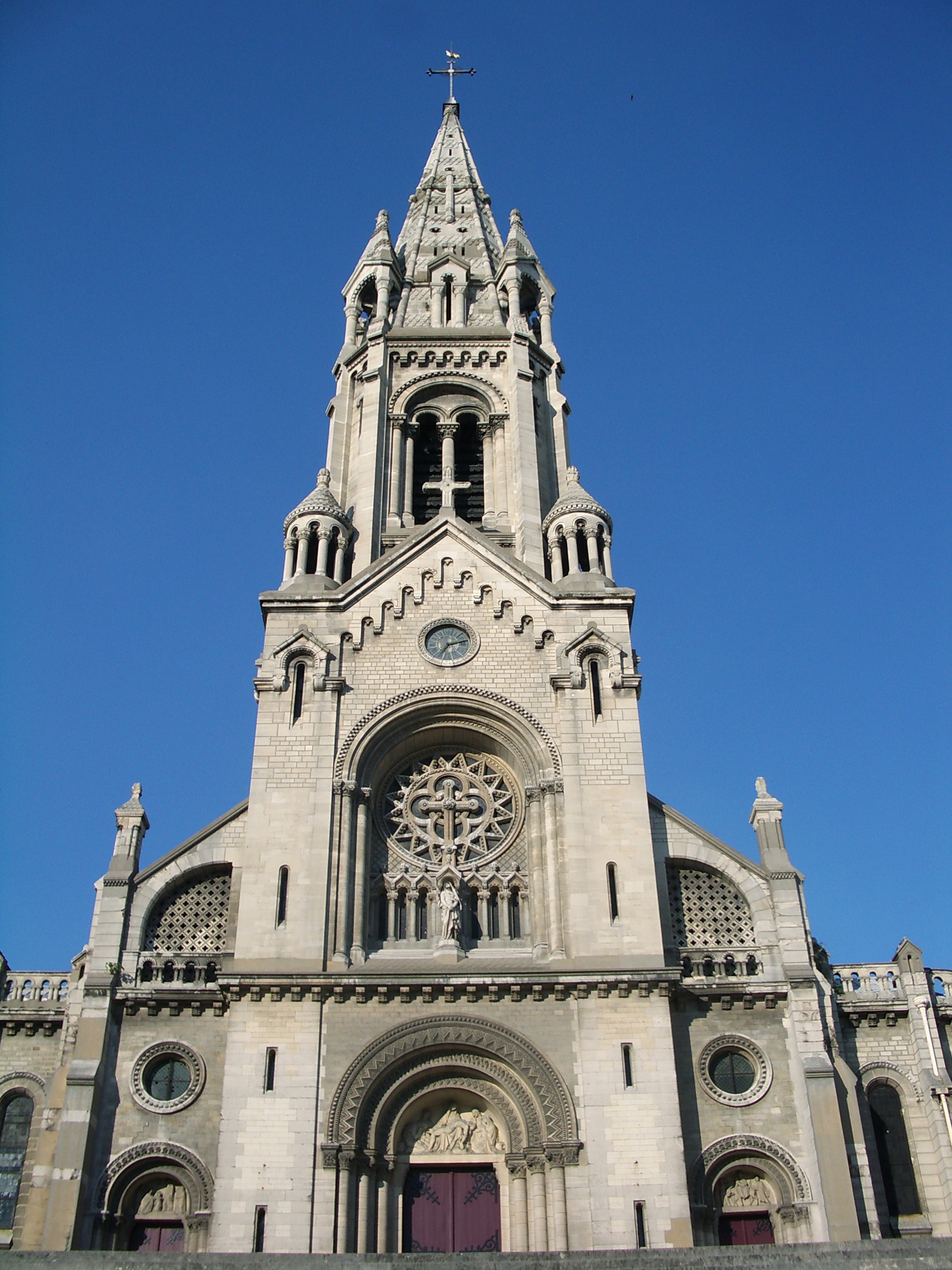 Vue de l'extérieur de Notre-Dame-de-la-Croix de Ménilmontant